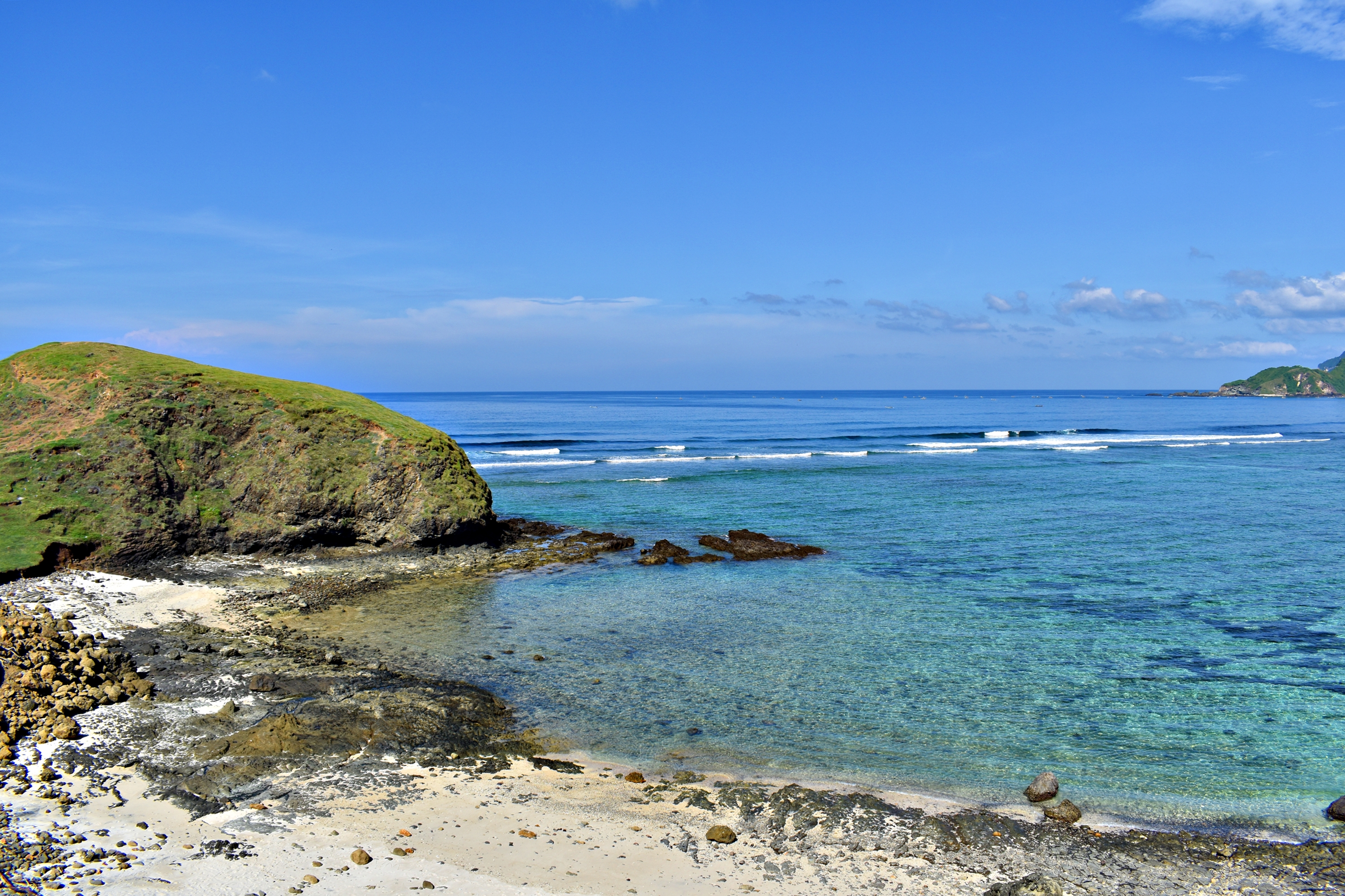 pantai yang terletak di kawasan pantai selatan lombok